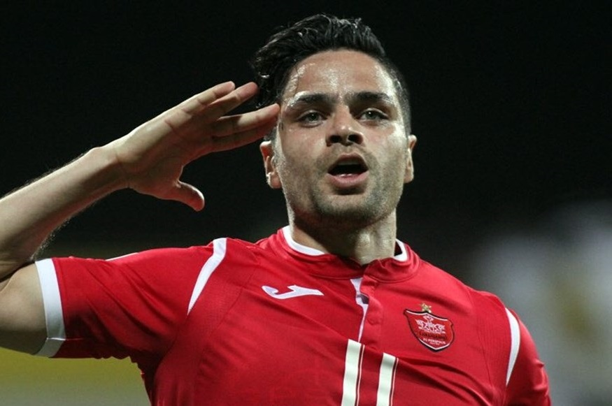 کمال کامیابی‌نیا در پرسپولیس برابر الوصل امارات در لیگ قهرمانان آسیا